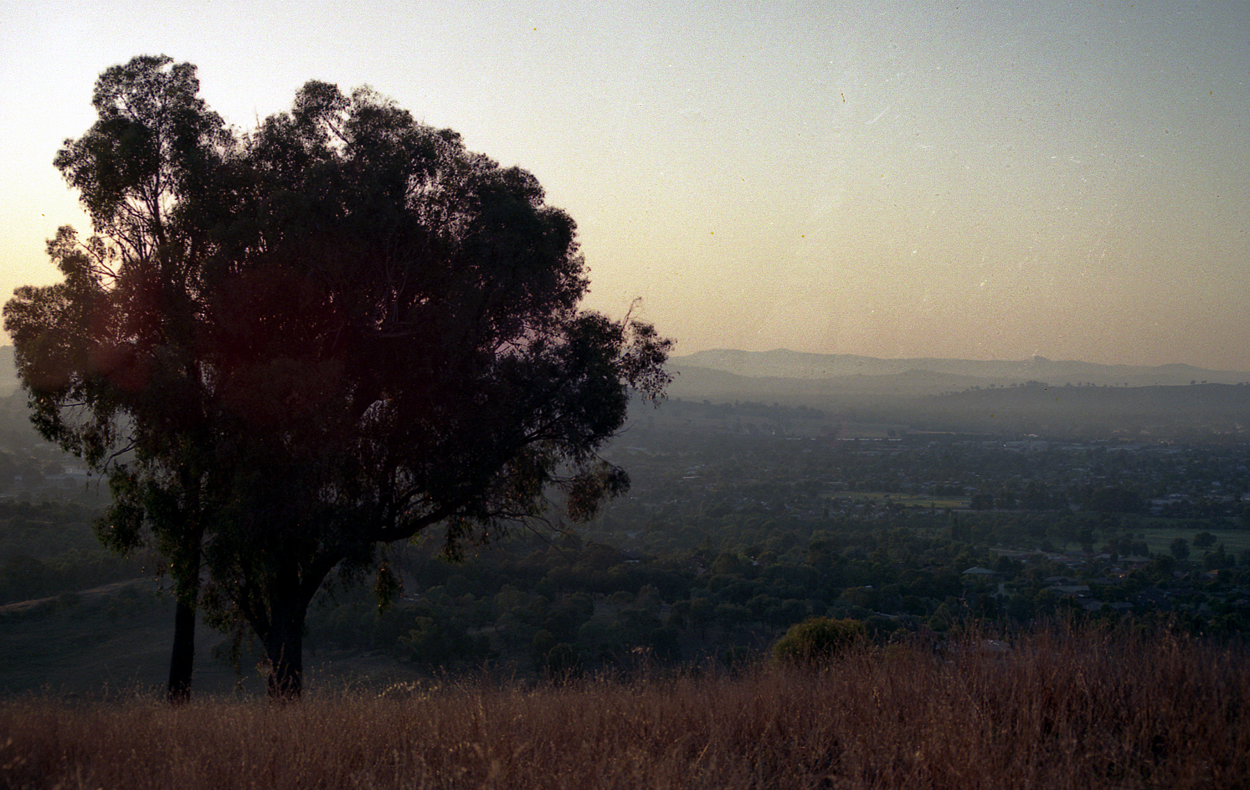 Wodonga, Victoria